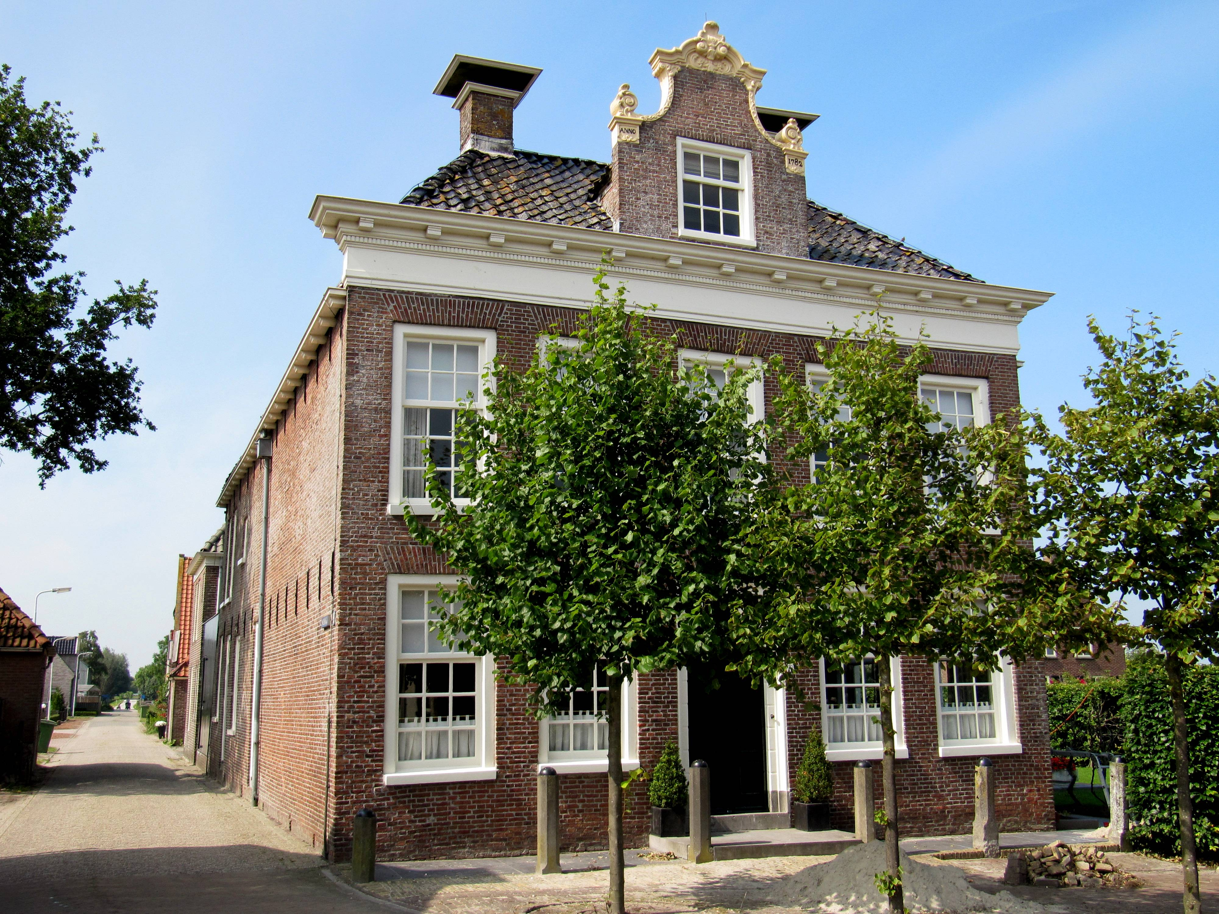 Voormalig Rechthuis "De Beverkooy" aan de Buren 19 in Oosterzee